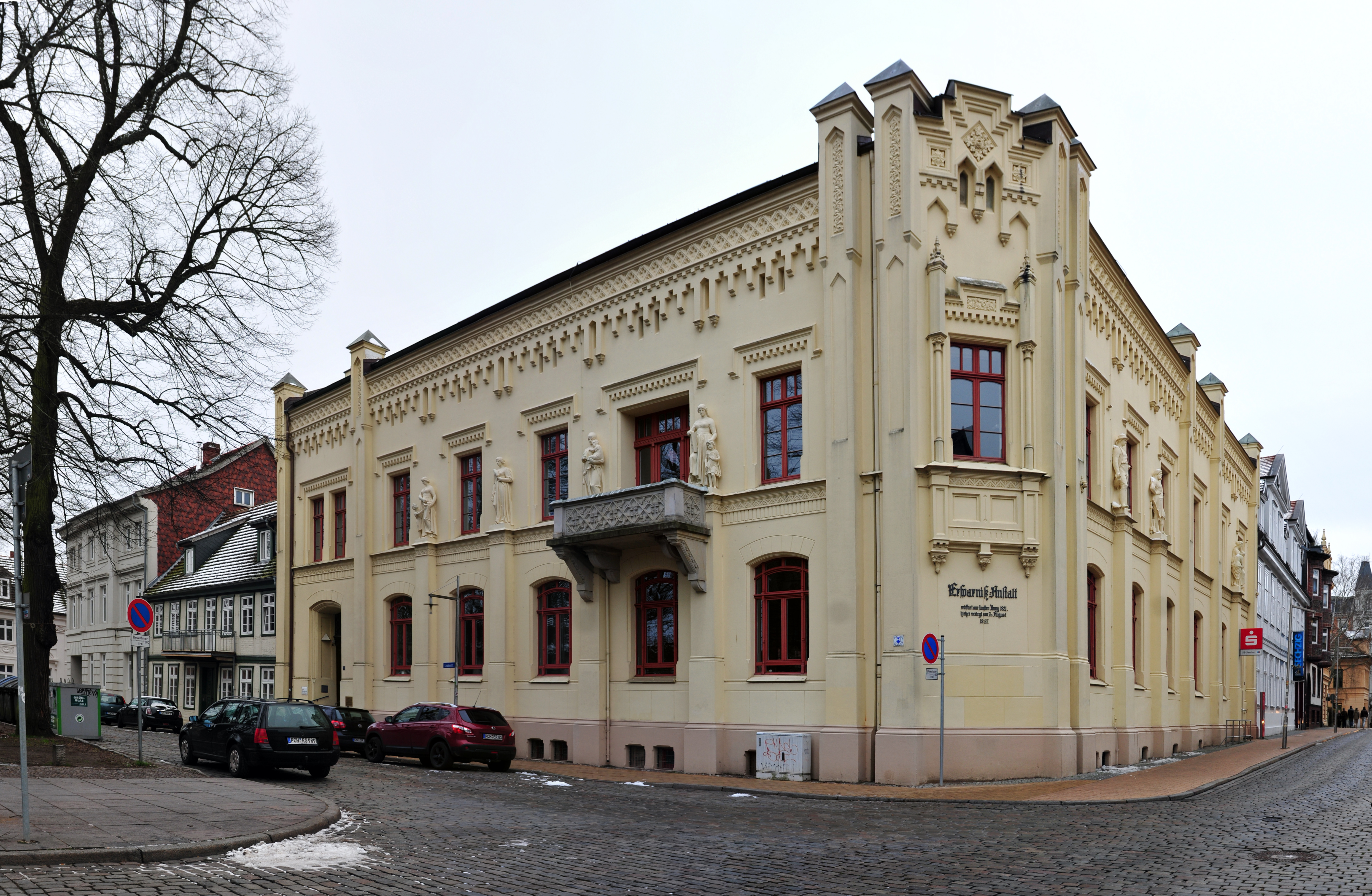 Der denkmalgeschützte Gebäudekomplex der ehemaligen Ersparnisanstalt (Vorläufer der Sparkasse) Lindenstraße 1 (linker Teil) / Puschkinstraße 2/4 (rechter Teil) im Stadtteil Schelfstadt in Schwerin, Mecklenburg-Vorpommern.